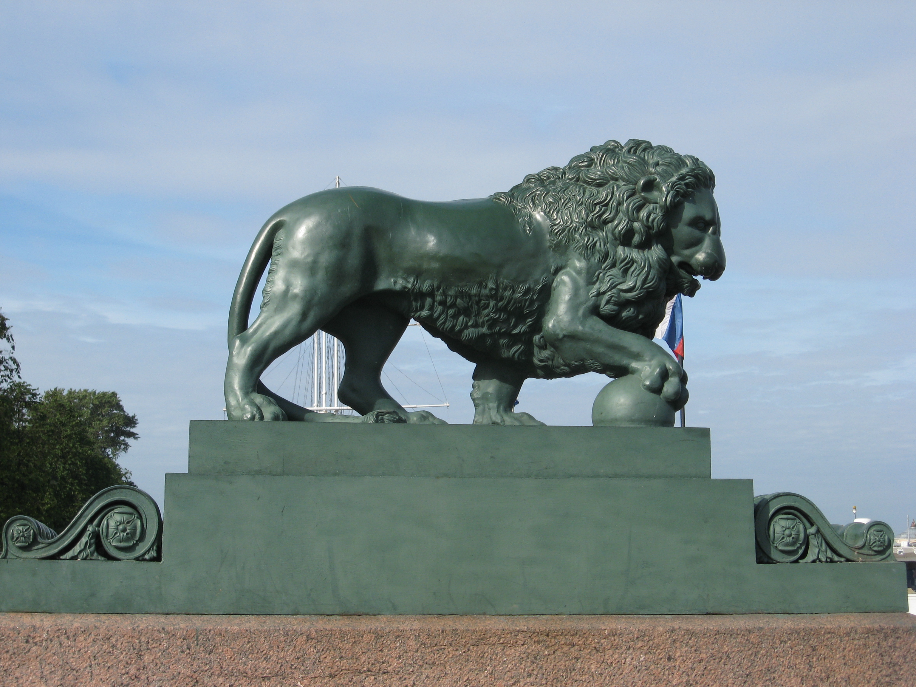 Дворцовый спуск со львами и пристанью: Адмиралтейская набережная, у восточного павильона Адмиралтейства, Адмиралтейский район, Санкт-Петербург